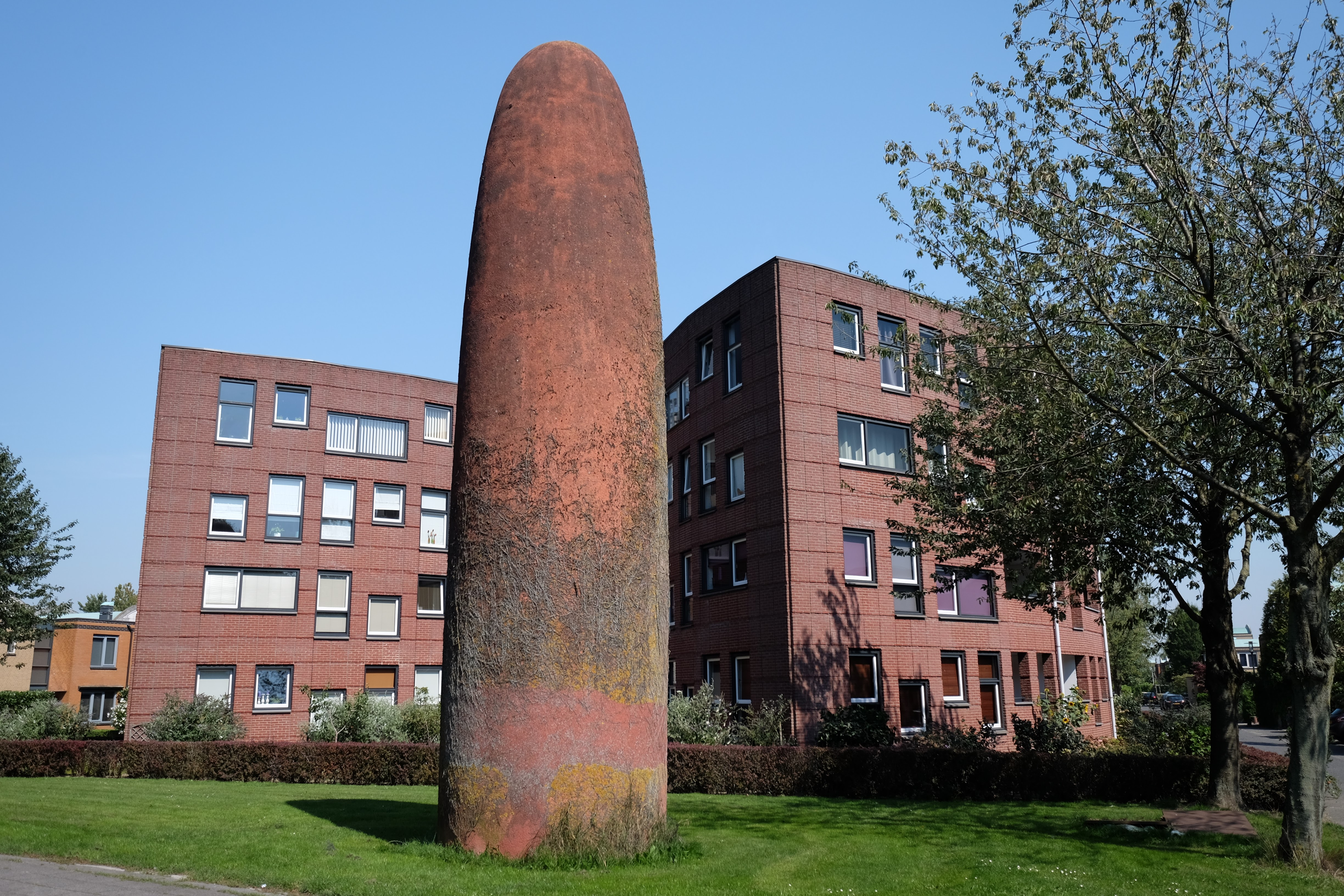 De Verwondering, 3823 Amersfoort, Netherlands